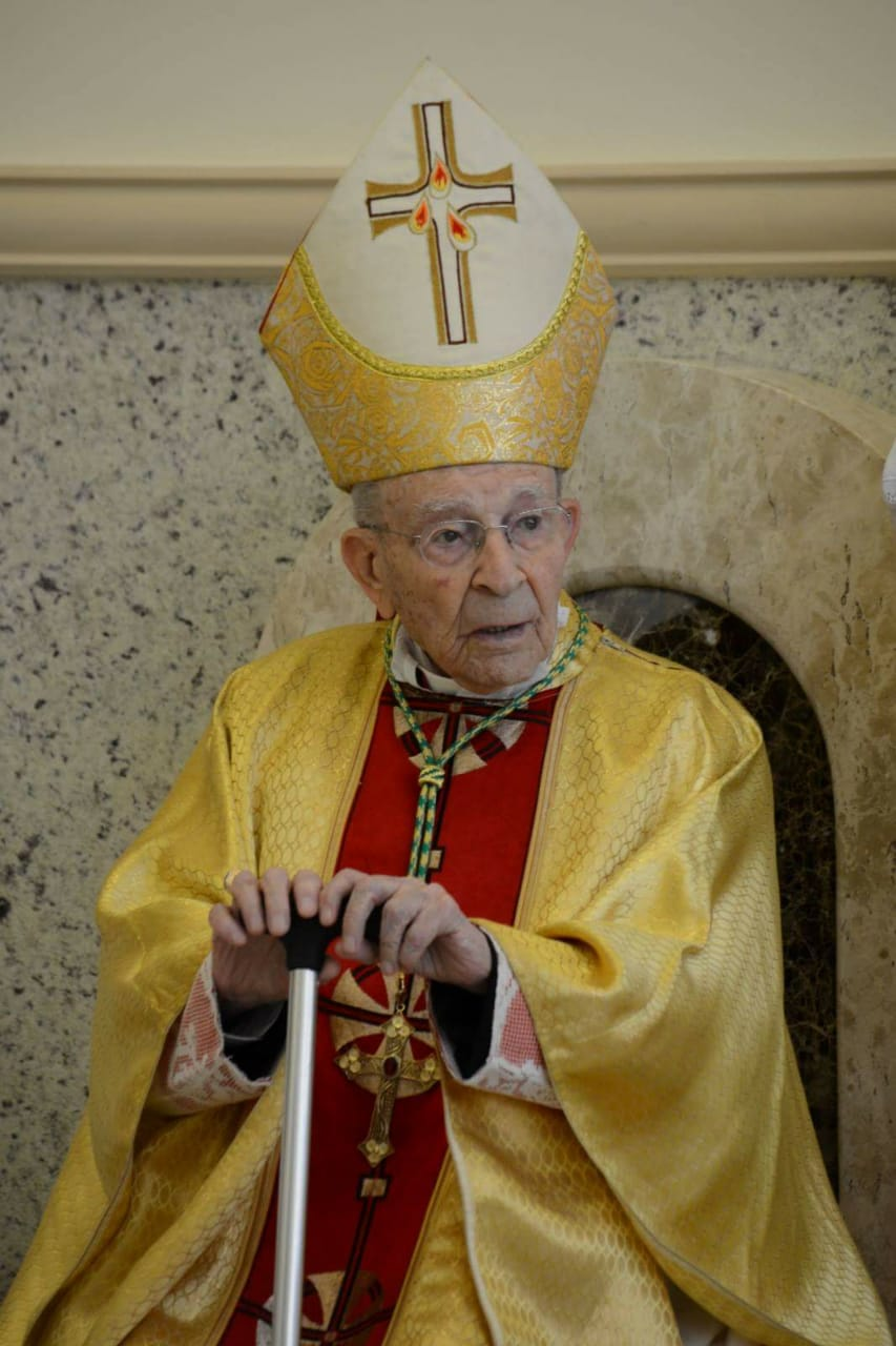 Dom Antônio Affonso de Miranda, SDN